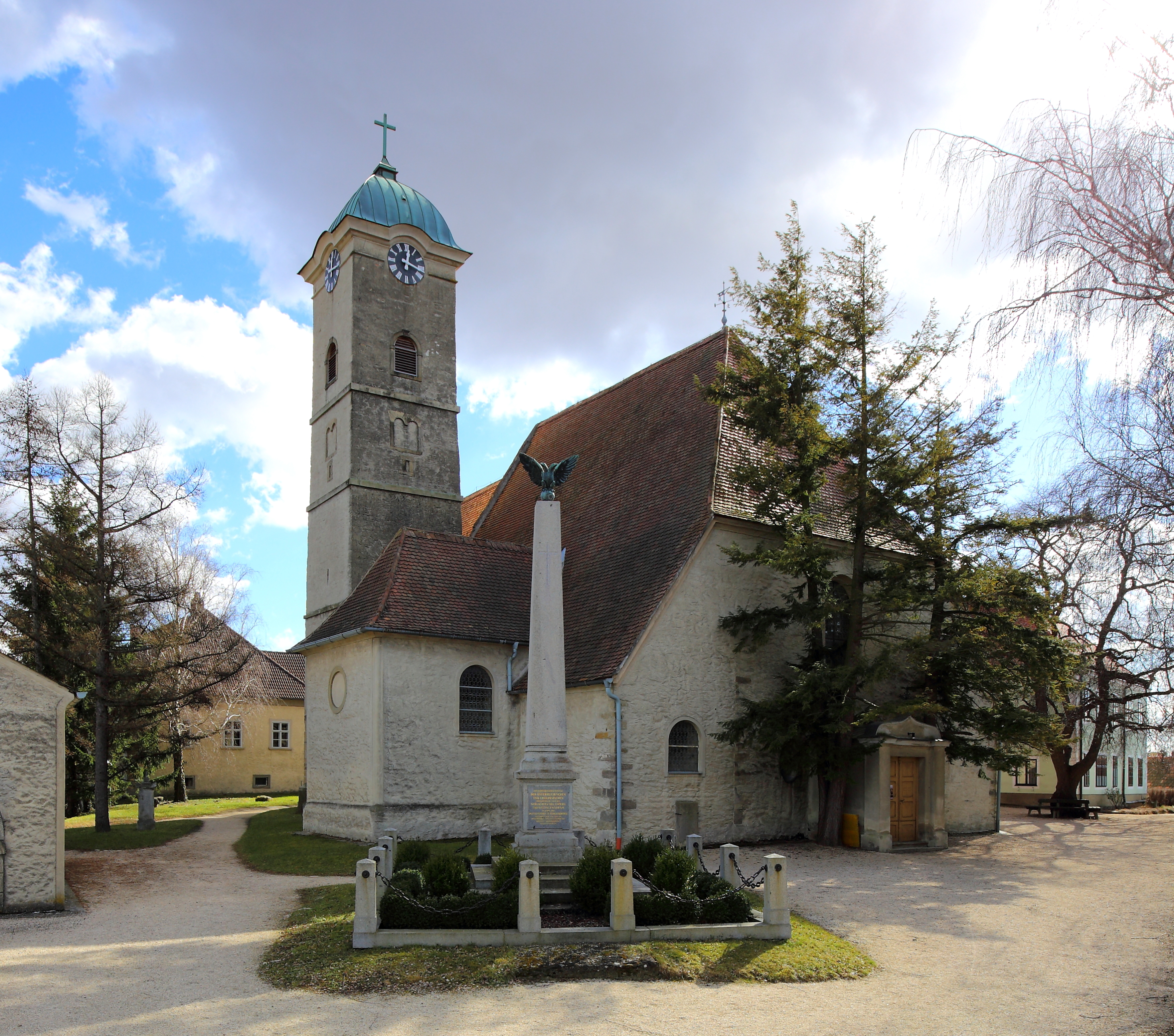 Nordwestansicht der katholischen Pfarrkirche Hl. Ulrich in Ulrichskirchen, ein Ortsteil der niederösterreichischen Marktgemeinde Ulrichskirchen-Schleinbach. Eine gotische Staffelkirche aus dem Ende des 13. Jahrhunderts, die barockisiert wurde. Unter anderem wurde dem Turm 1669 ein barockes Glockengeschoß aufgesetzt. 1954 plaques for cultural property protected by the Hague Convention in Austria